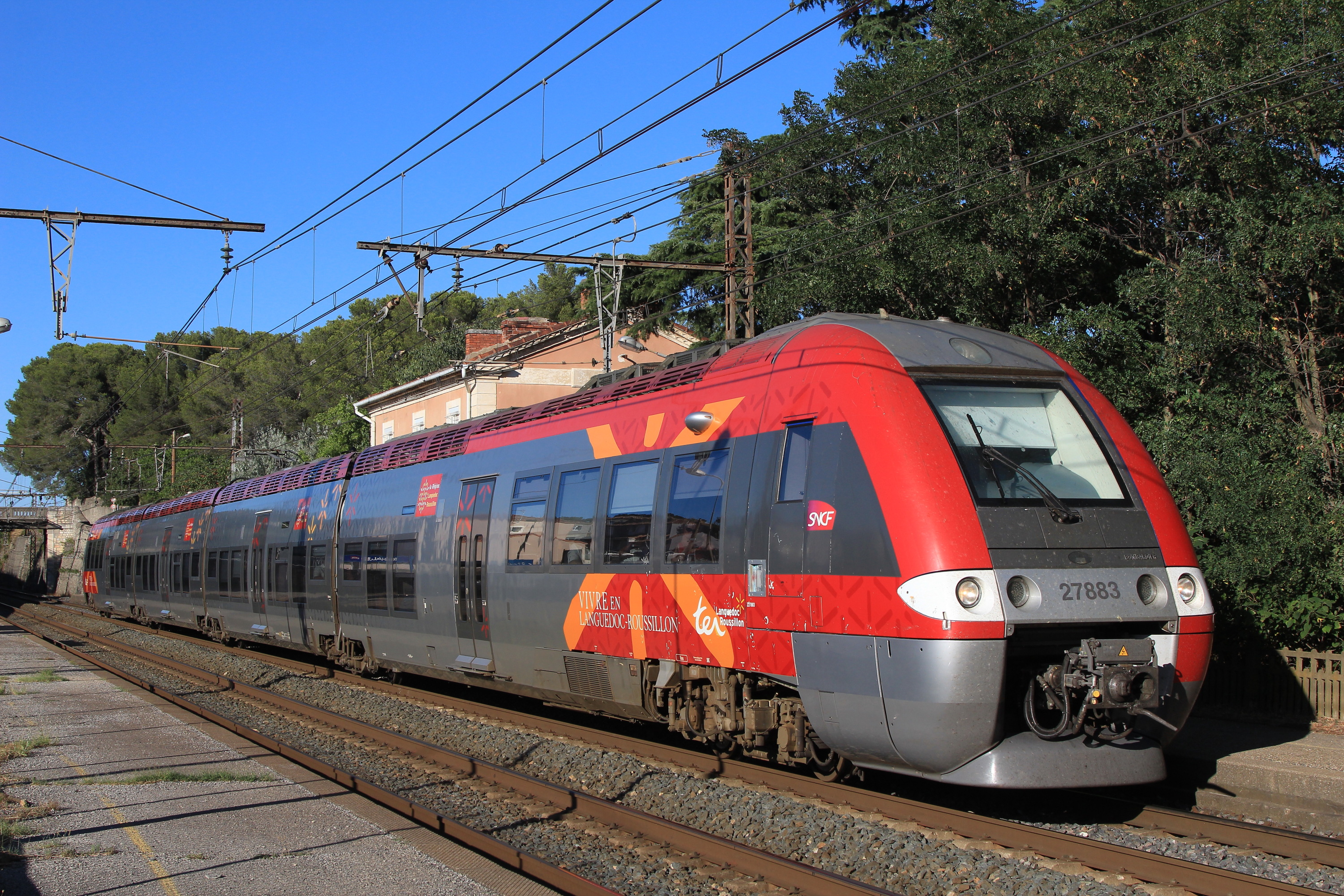 La Z 27883 assurant le TER 876313 (Avignon - Narbonne) marque l'arrêt en gare de Milhaud.